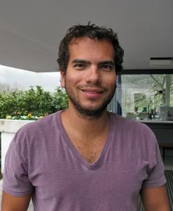 Foto di Artur Ávila